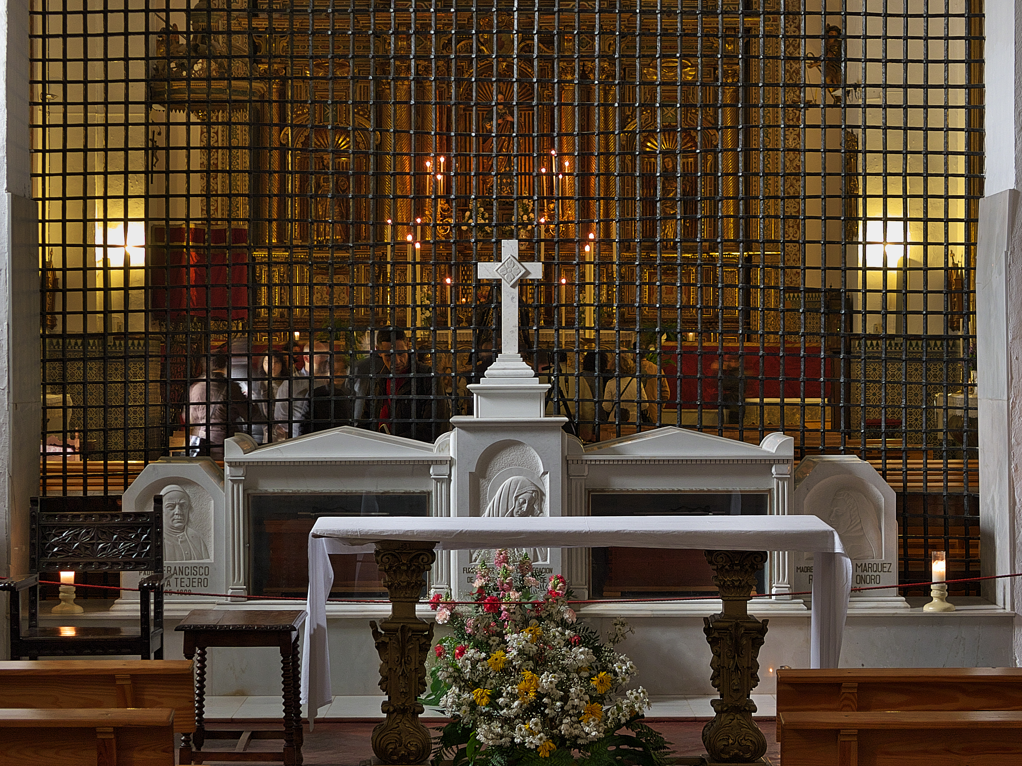 Coro del Convento de Santa Isabel (Sevilla) con los restos de la venerable Dolores Márquez Romero (†1904) y Padre Tejero (†1909), fundadores de la Congregación de Religiosas Filipenses Hijas de María Dolorosa.